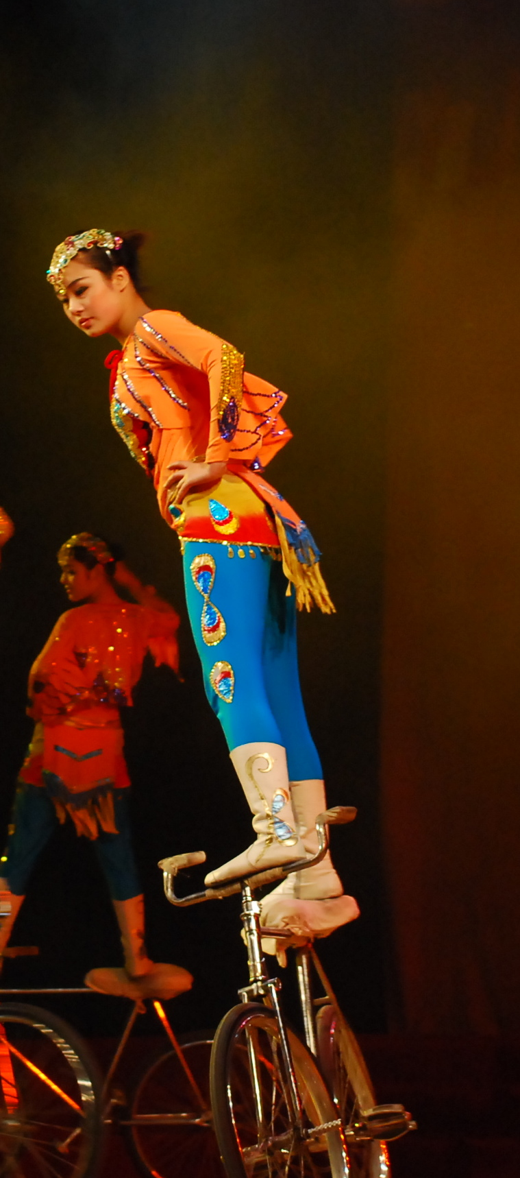 杂技自行车